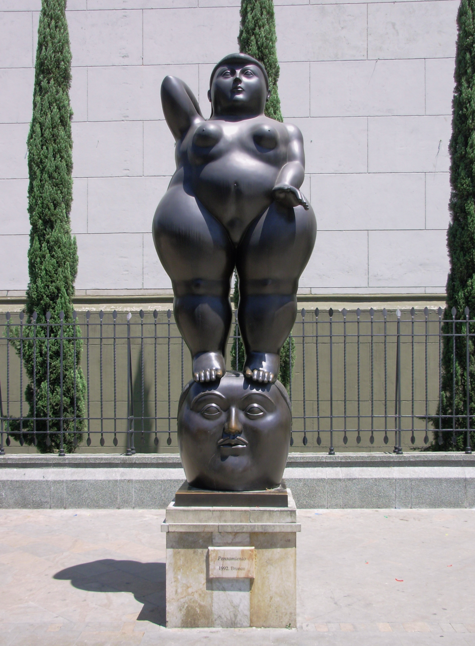 Pensamiento